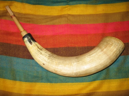 Cuerno de toro con caña en forma de lengüeta